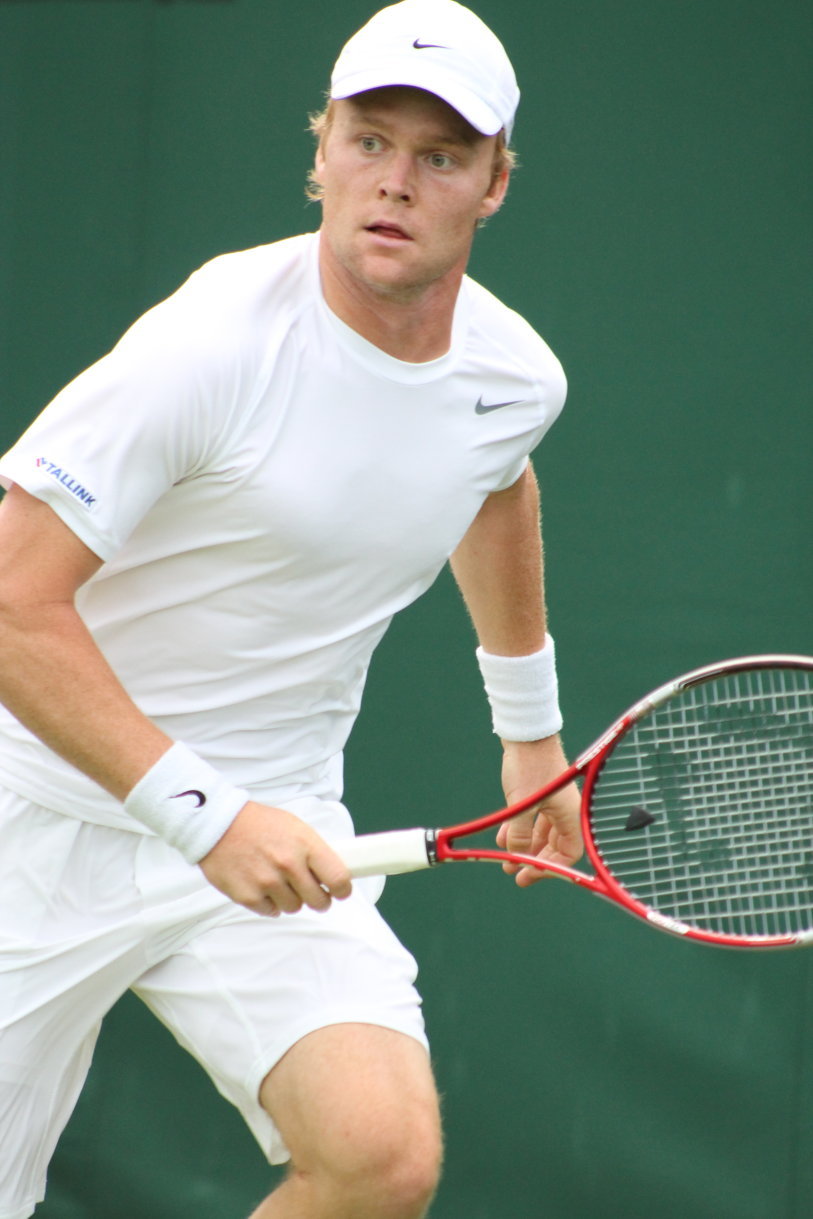 Zopp WM13-015